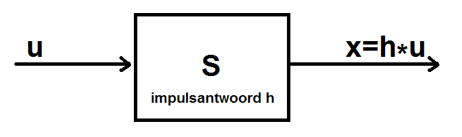 Systeem (regeltechniek) zelf, paint